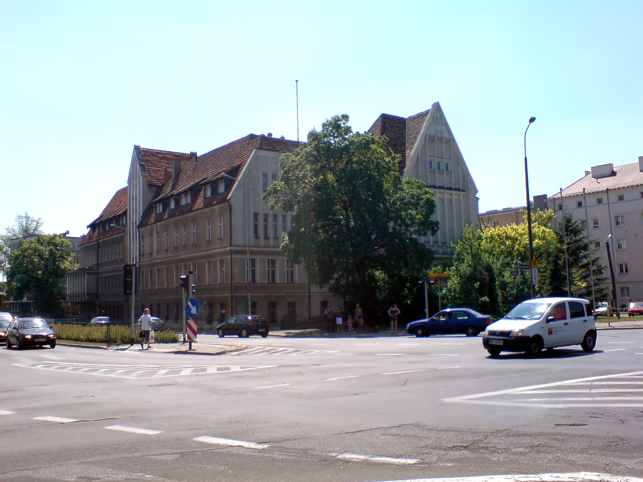 Starostwo powiatowe powiatu poznańskiego wschodniego w Poznaniu